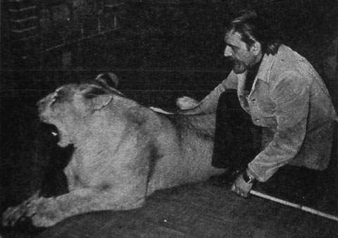 Muñiz Alique acaricia a un joven "Leo" (dieciséis meses de edad por aquel entonces) mientras éste juega con un cepillo (mil gracias a Mario Ferrari).